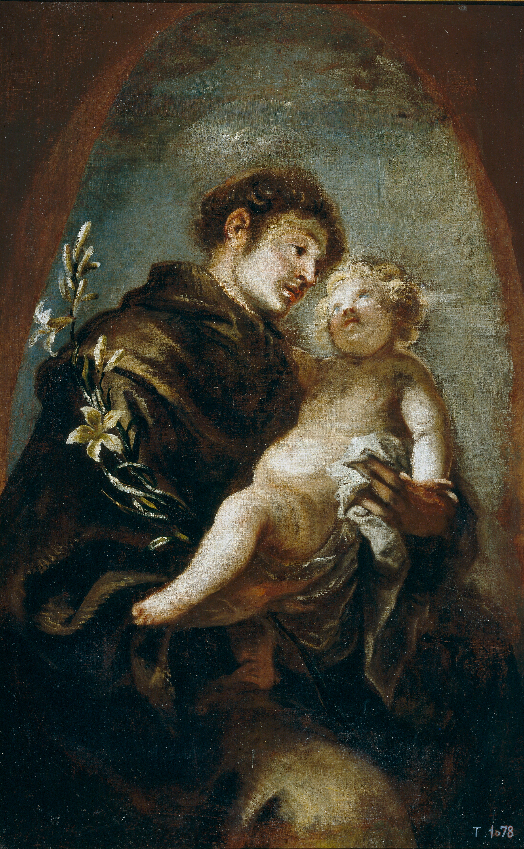 La obra representa a San Antonio de Padua llevando en brazos al Niño Jesús.